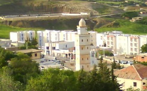 COMMUNE DE DEHAMCHA . sétif